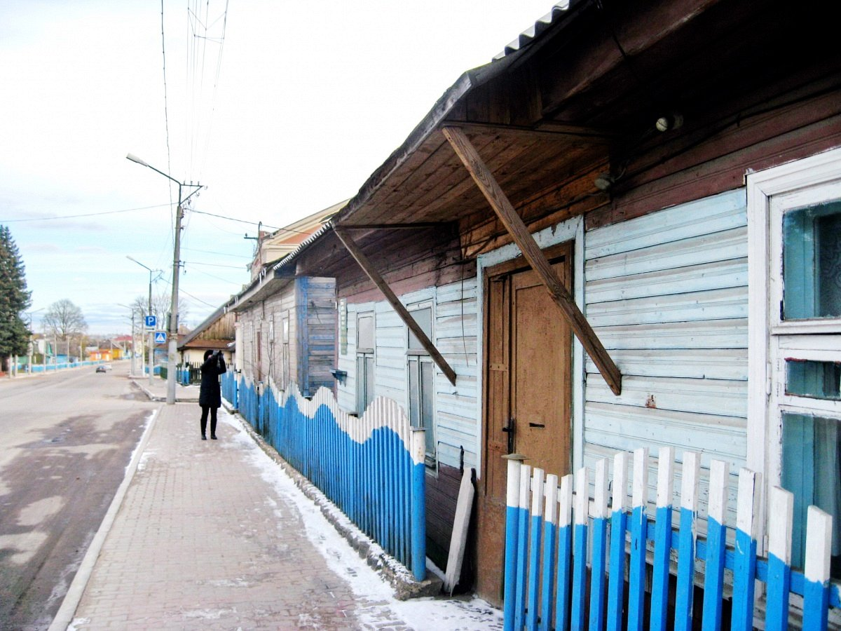 Валожын. Драўляная забудова